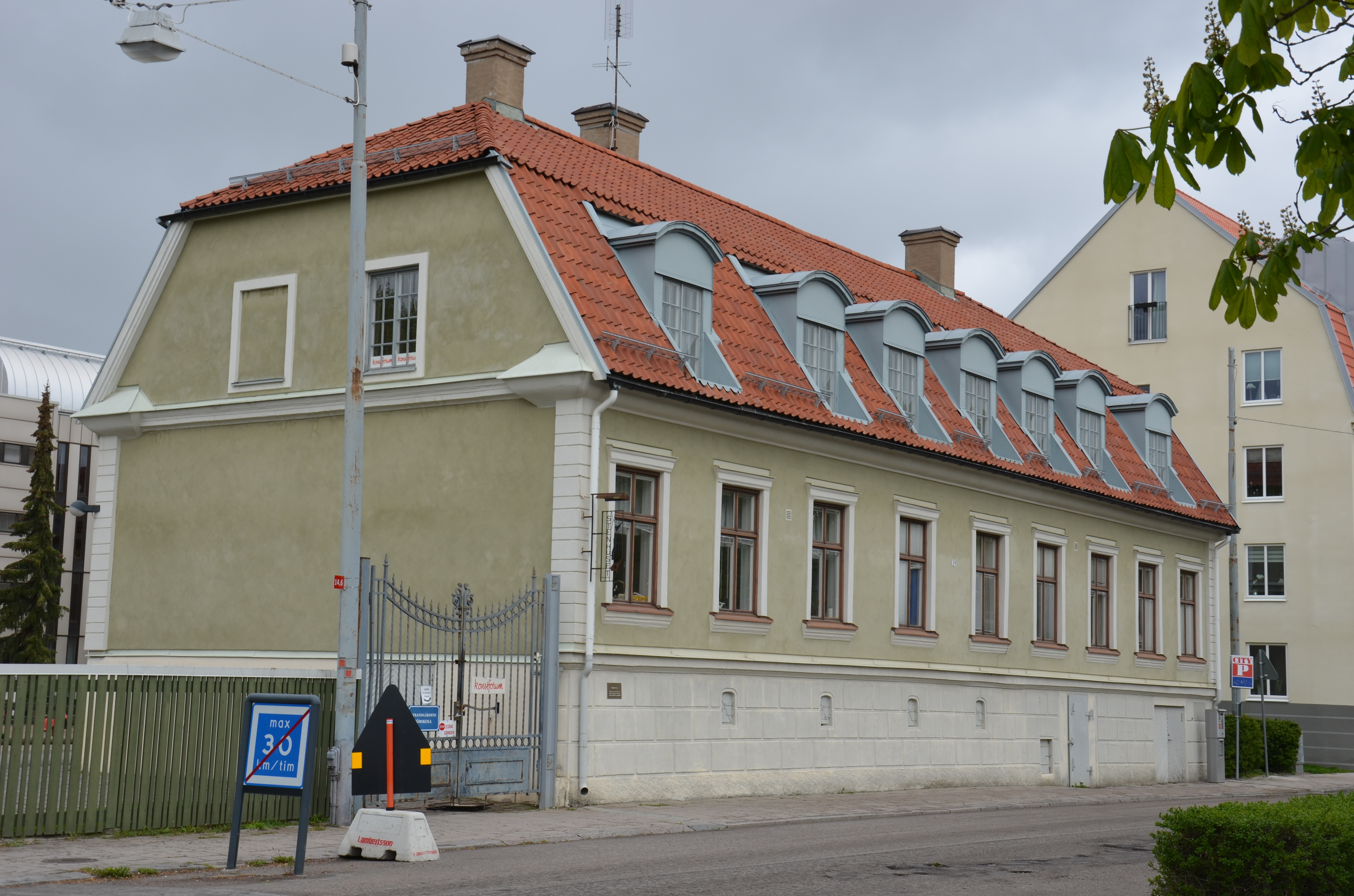 Stenhuset (The Stone House), Saltängen in Norrköping Stenhuset på Saltängen, Saltängsgatan 19 i Norrköping